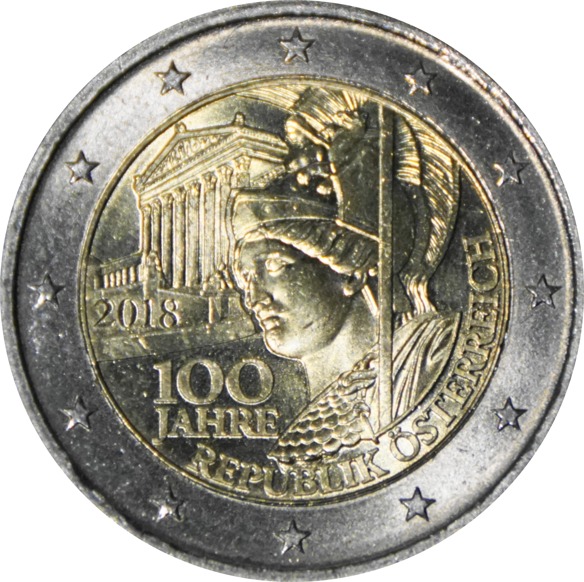 2-Euro-Gedenkmünze 2018: 100 Jahre Republik Österreich